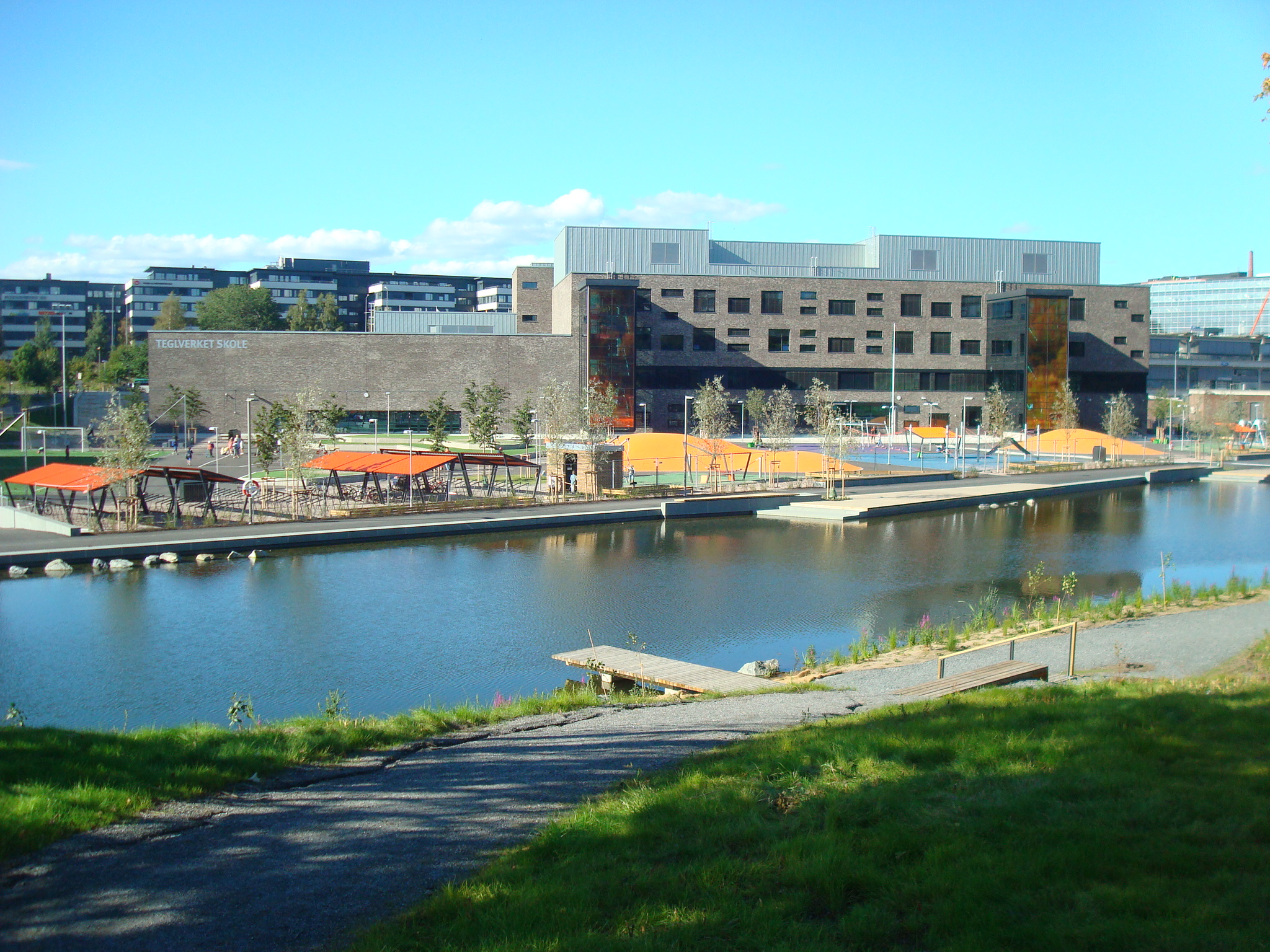 Teglverket skole med Hovinbekken (her Teglverkdammen) i forgrunnen.